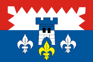 Vlajka obce Branky, okres Vsetín. List tvoří dva vodorovné pruhy, červený a modrý. Uprostřed kvádrovaná věž s prázdnou branou, dvěma černými okny a cimbuřím se třemi zuby. Horní polovina věže je modrá na polovině bílého kopřivového listu přiléhajícího k modrému pruhu. Dolní polovina věže je bílá, provázená třemi liliemi, z nichž dvě bílé jsou po jejích stranách a třetí, žlutá, je pod ní a sahá do prázdné brány.